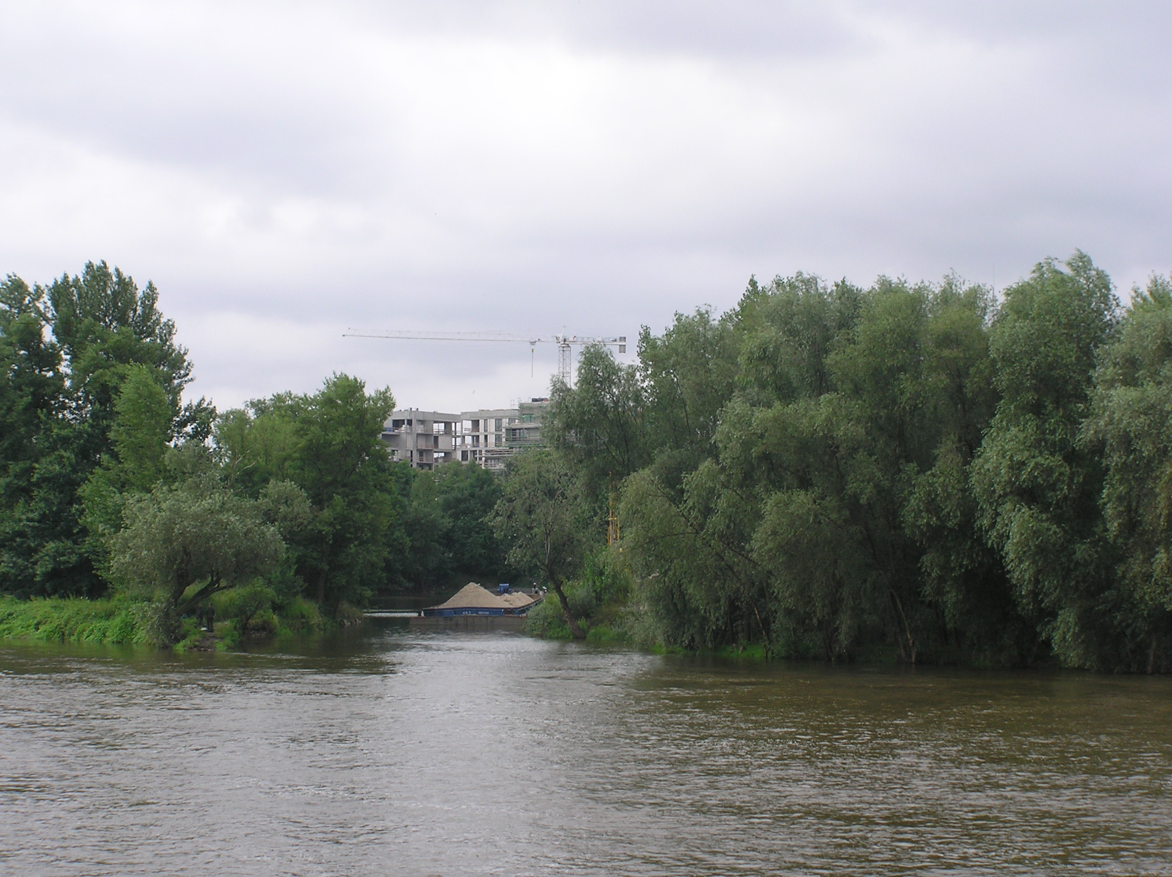 Wrocław, Port Ujście Oławy